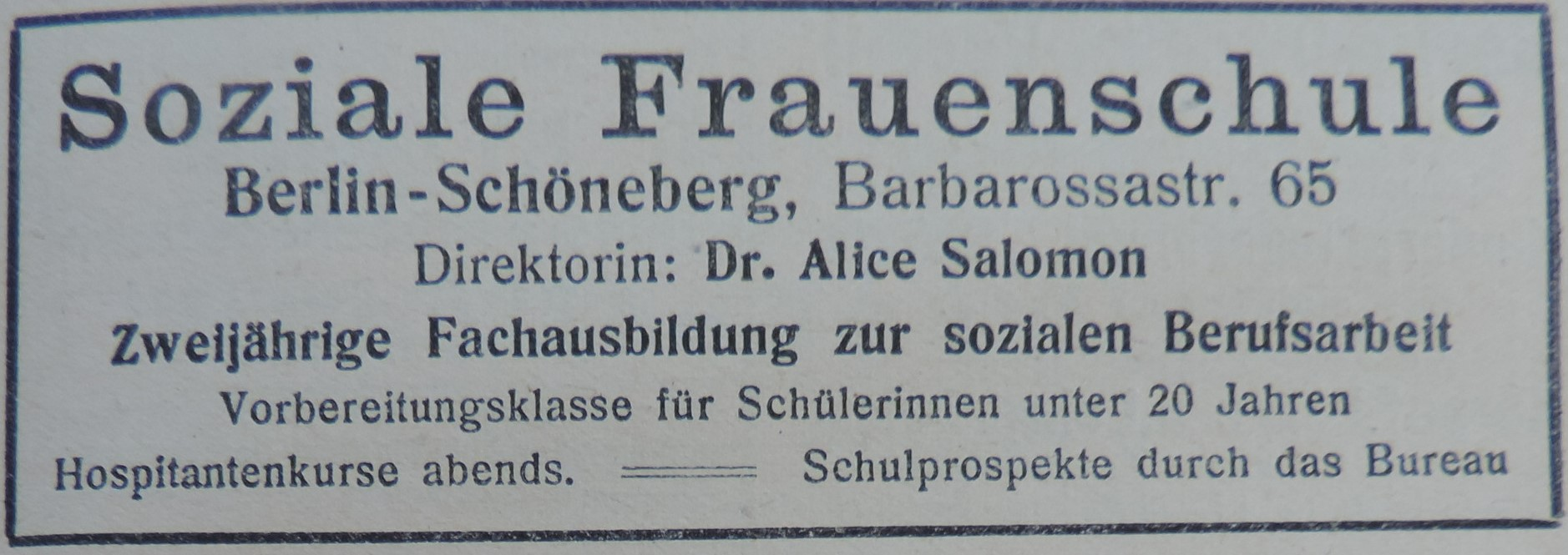 Anzeige Soziale Frauenschule Berlin-Schöneberg